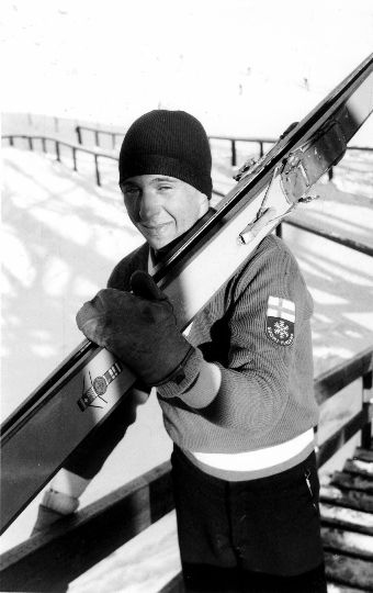 Mäkihyppääjä Ensio Hyytiä (1938–) kantamassa suksiaan Lahden MM-kisoissa.